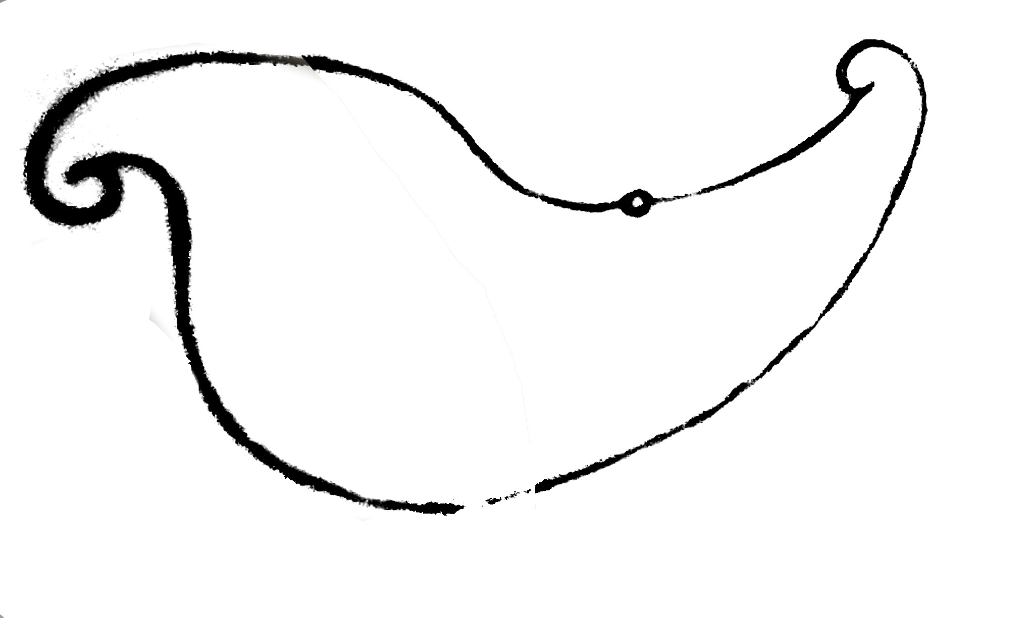 සිංහල: පැරැණි චිත්‍ර ශිල්පියා තම ගෝලයාට මුලින් ම දු රේඛා අභ්‍යාසය "වක දෙක".